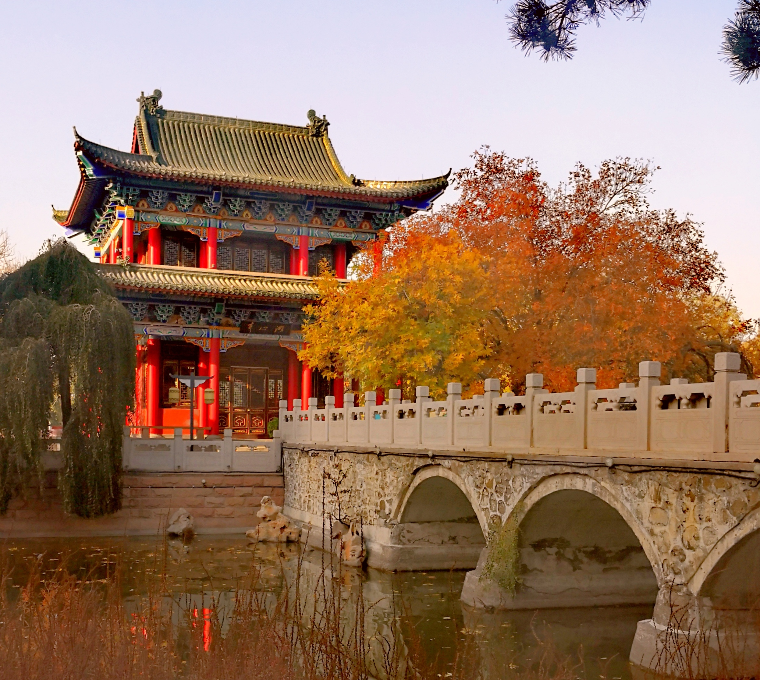 乌鲁木齐人民公园湖心亭